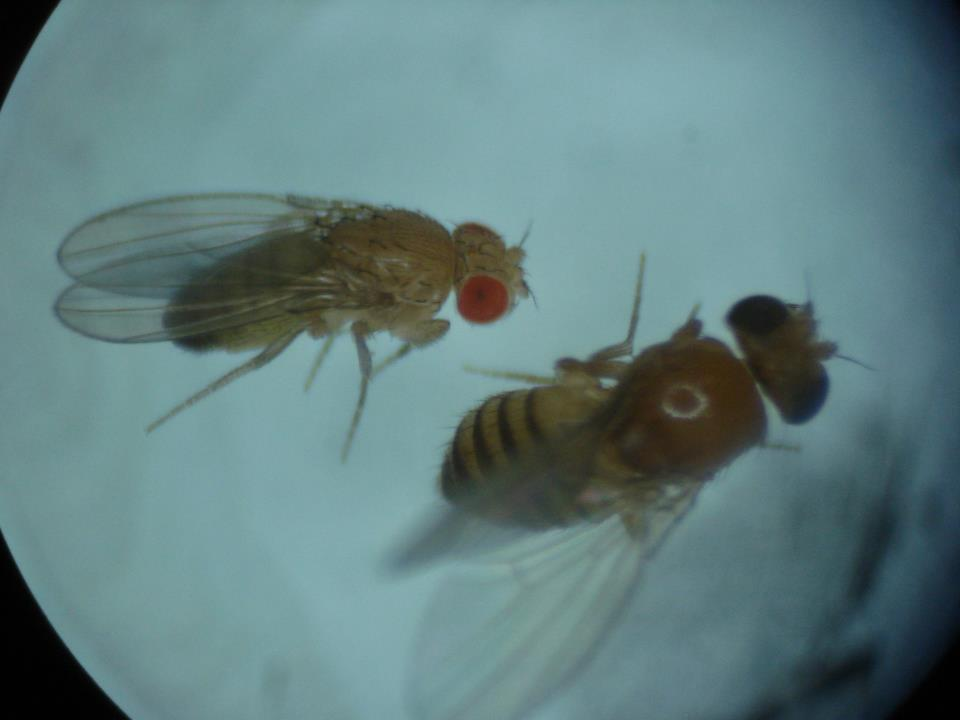 Exemplares adultos de Drosophila melanogaster